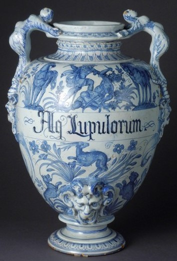 Foto del vaso comprato all'asta dall'IISL poco tempo fa